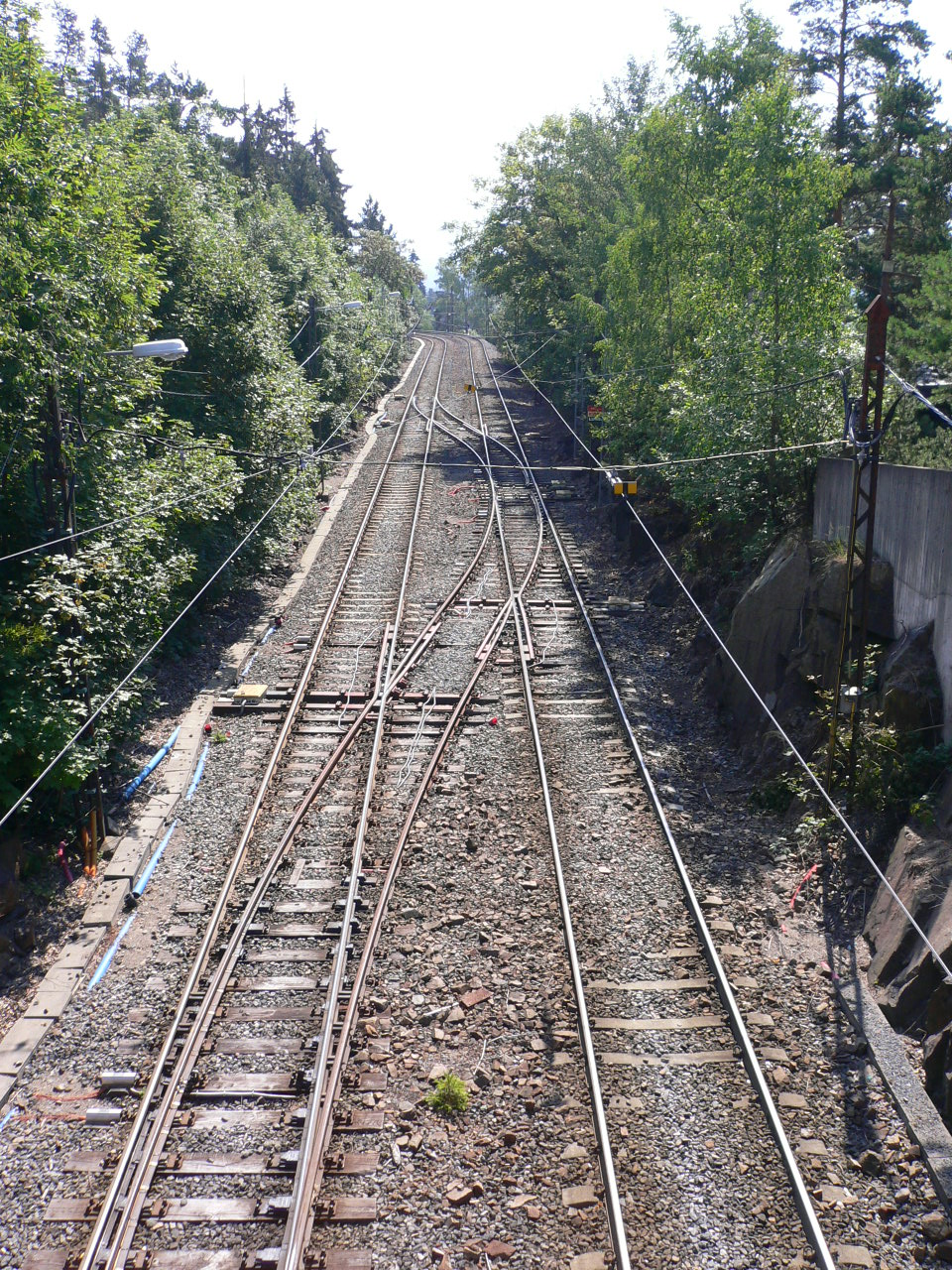 Holmenkollbanen of Oslo T-bane, Norway